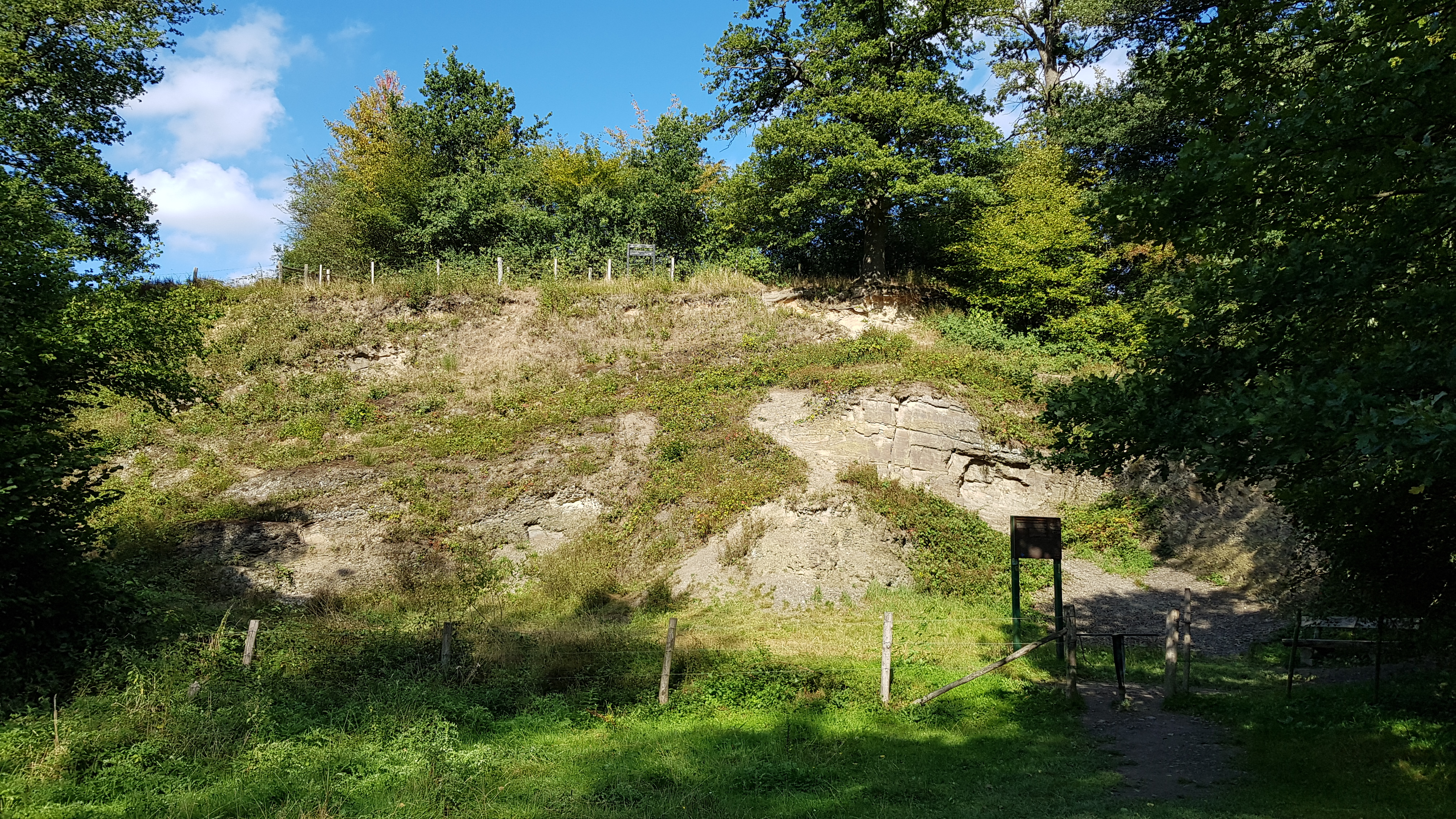 Geologisch monument Heimansgroeve, Vaals, Nederland